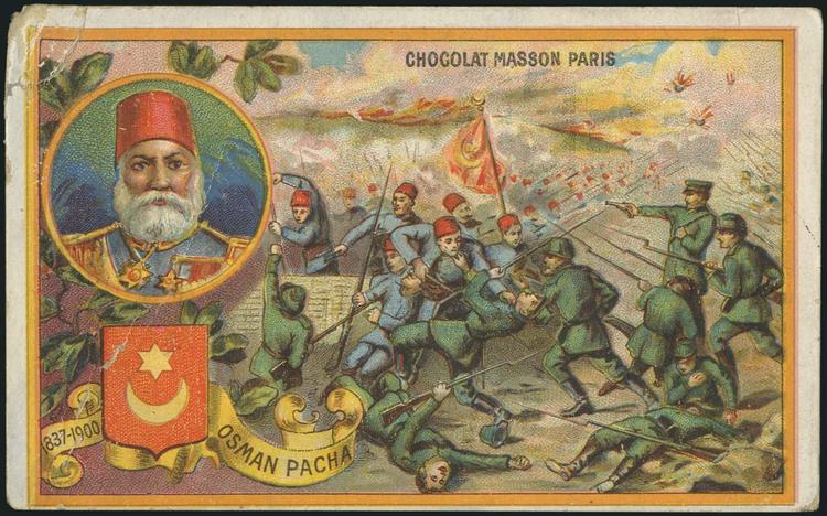 Пощенска картичка по повод смъртта на Осман паша, показваща сцена от Руско-турската война 1877 - 1878.